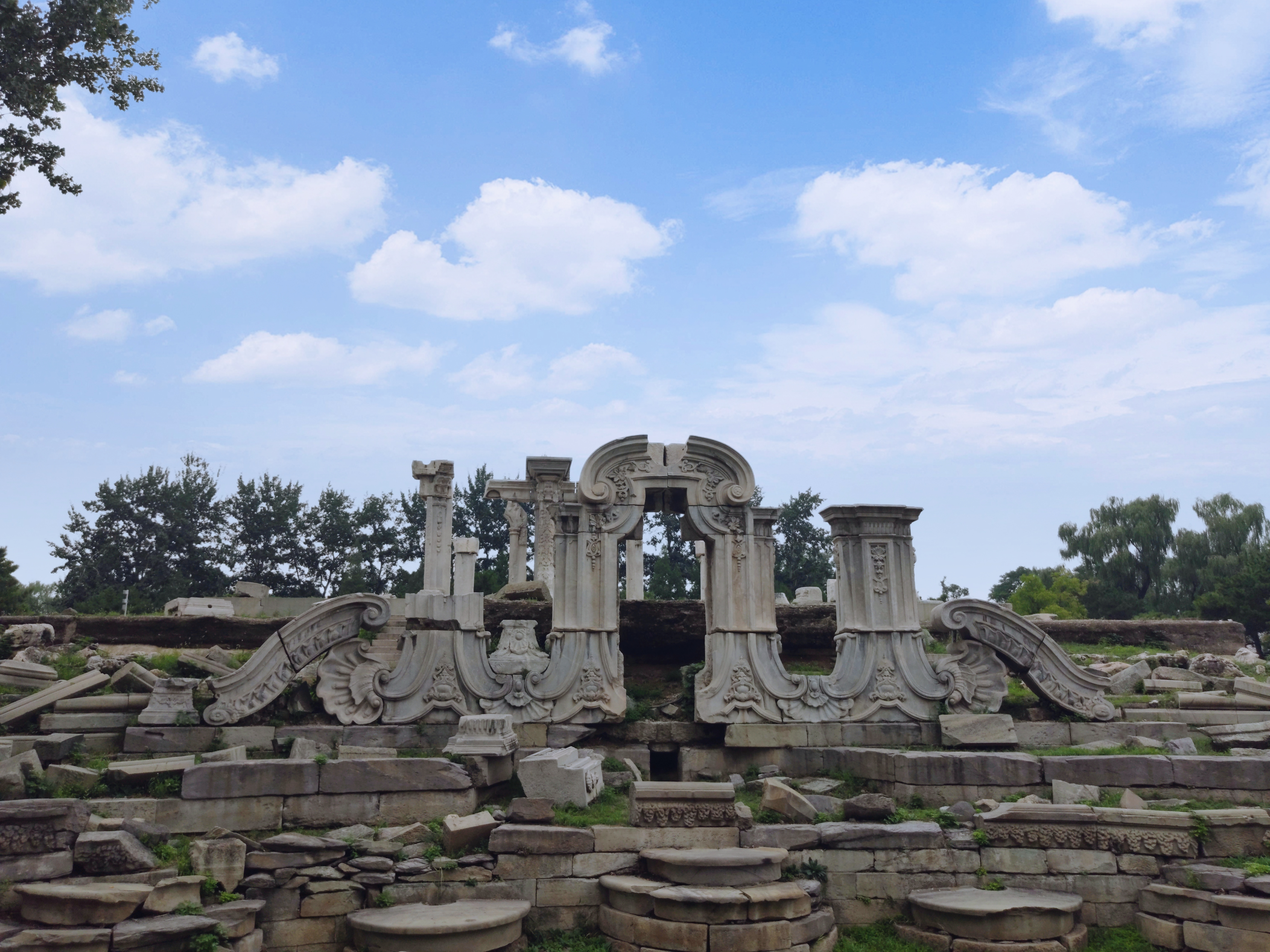 中文（中国大陆）: 圆明园大水法遗址图